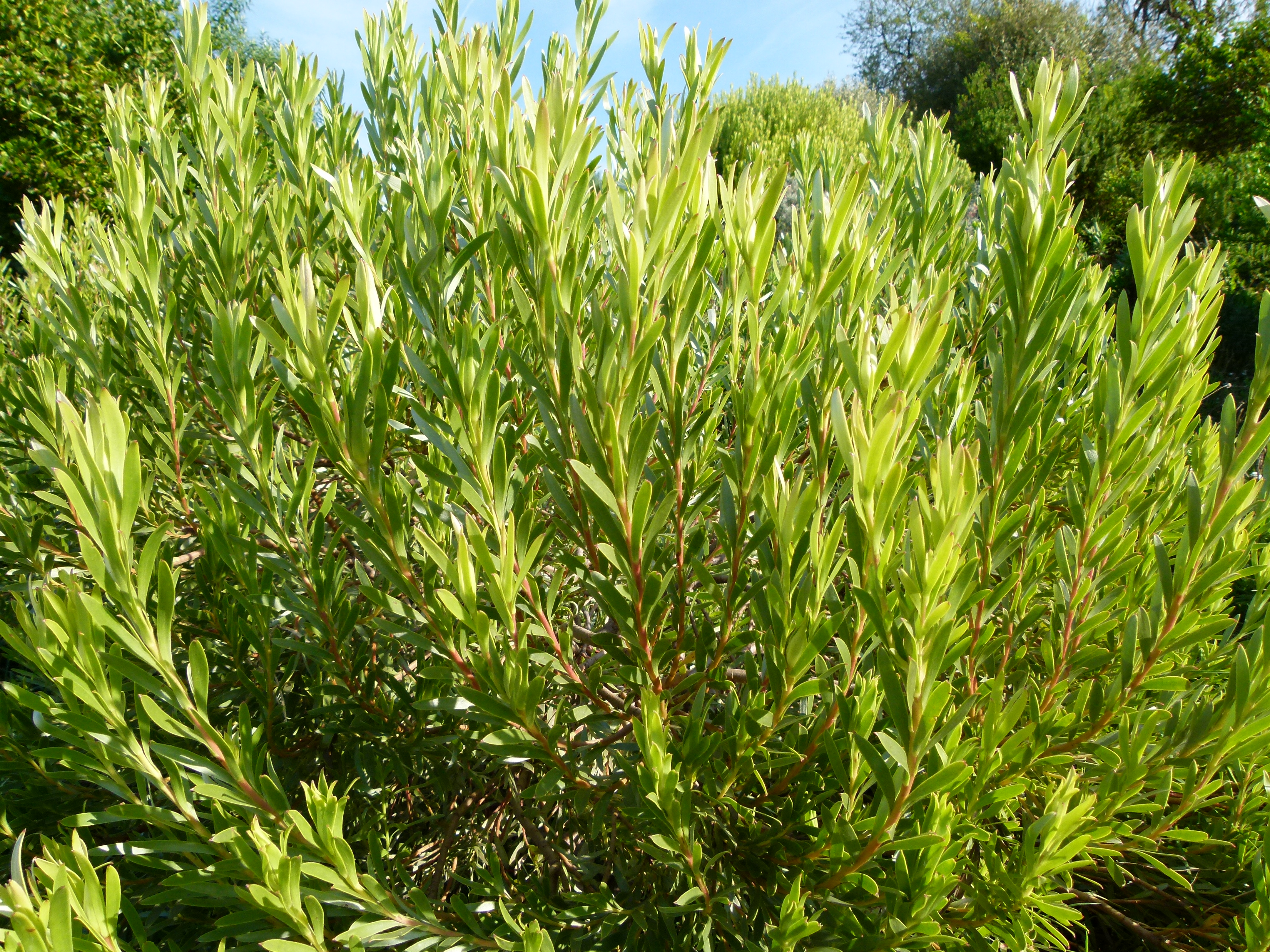 Jardin botanique Barcelone